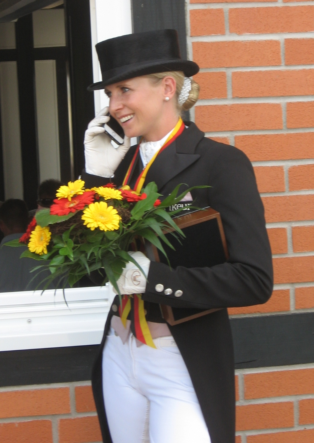 Jessica von Bredow-Werndl direkt nach der Siegerehrung der Deutschen Meisterschaft im Grand Prix Special beim Balve Optimum nach der Ehrung mit dem Bronze Medaille.